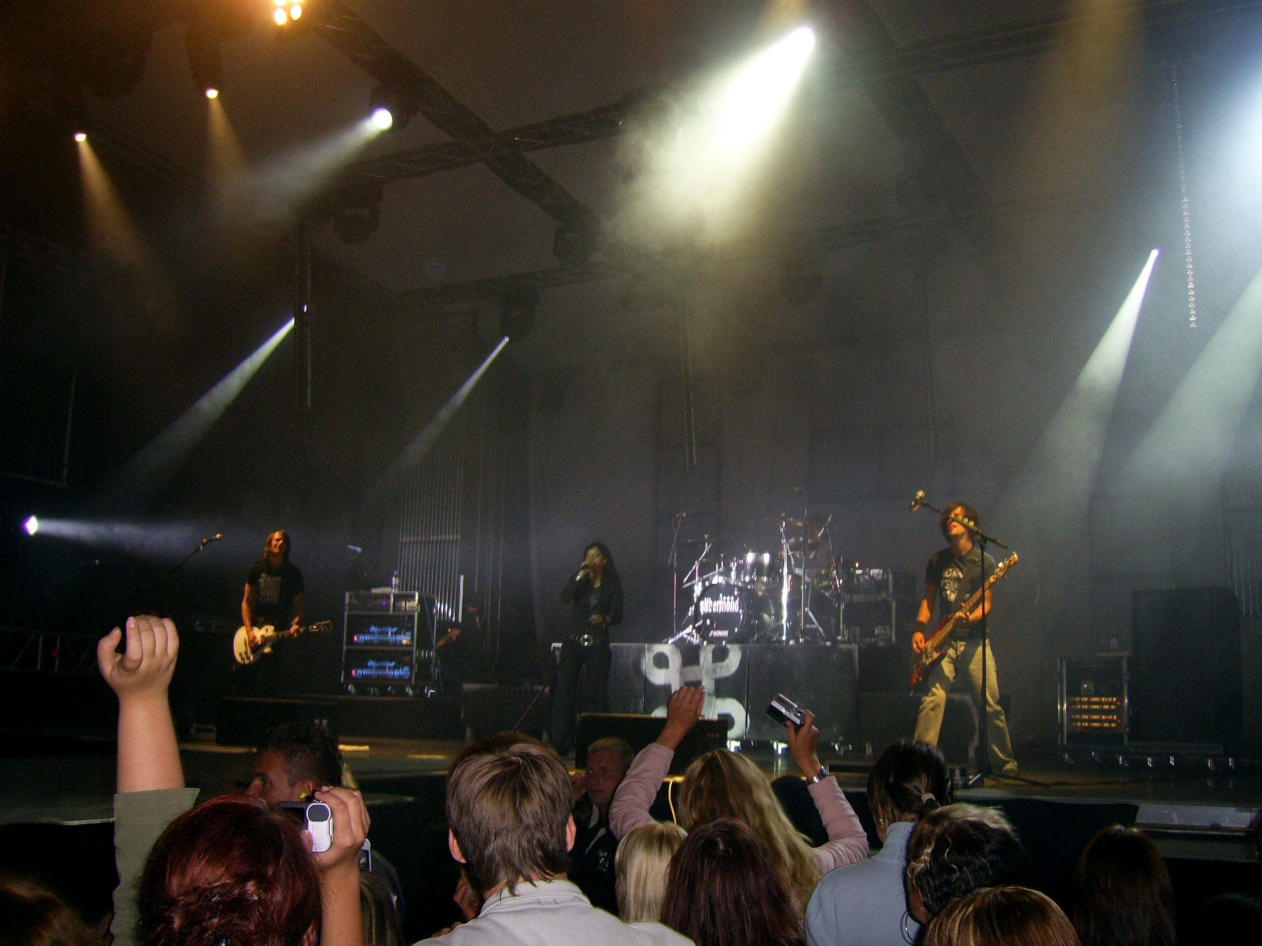 Band Silbermond Die Band Silbermond auf der Jump Arena 2006 in Naumburg (Saale)